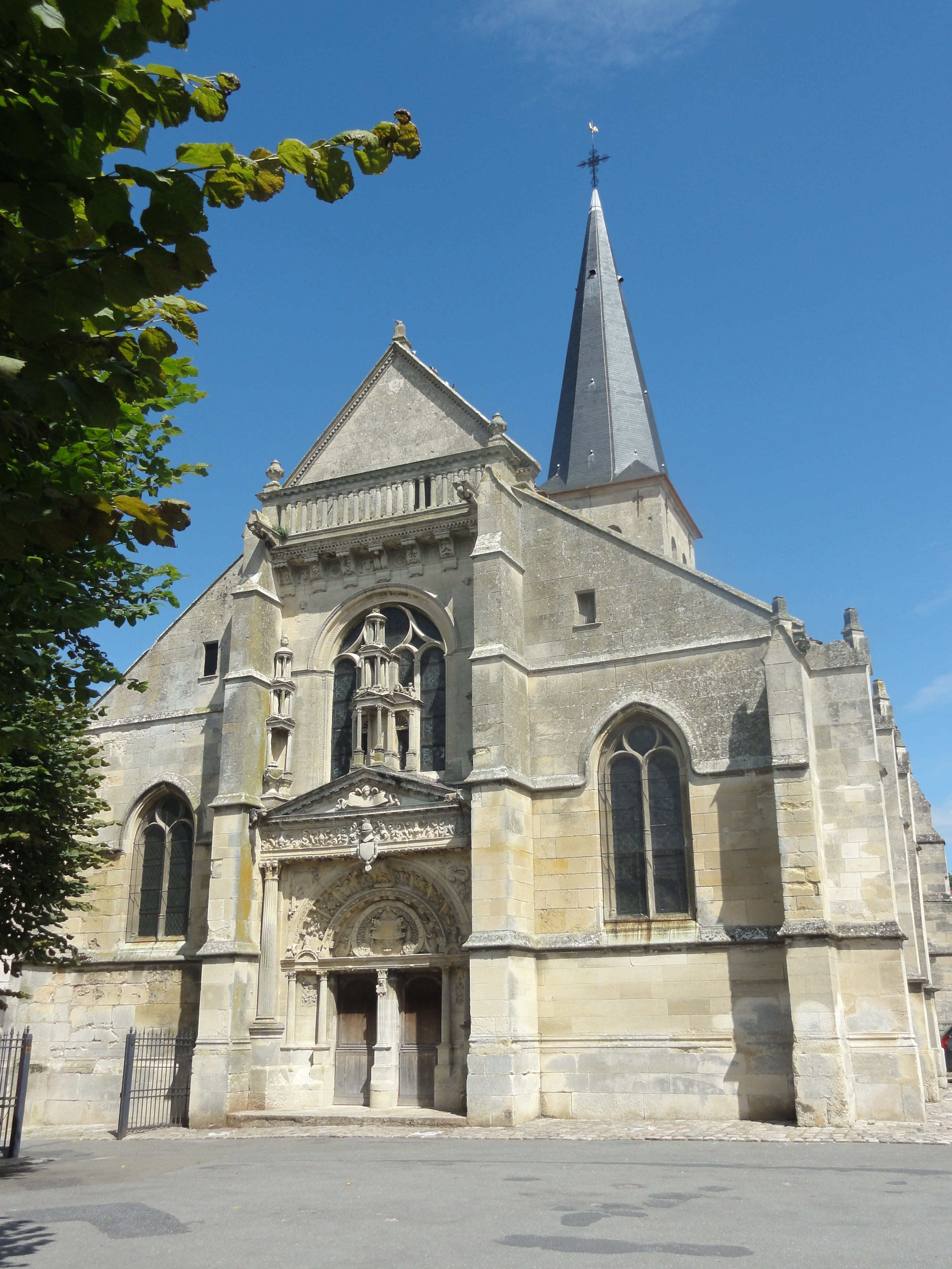 Façade sud-ouest.